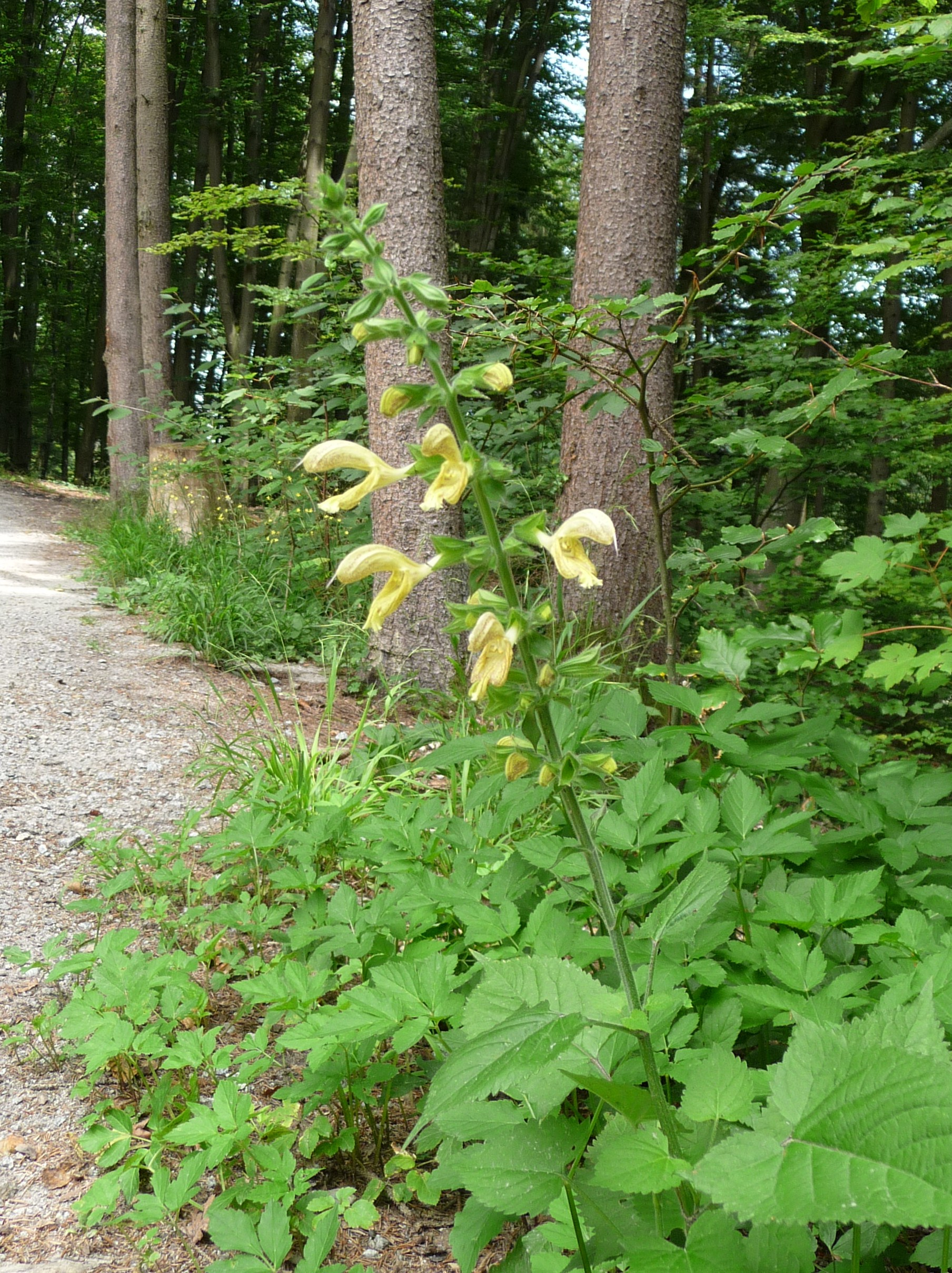 Klebriger Salbei in der Vornbacher Enge bei Vornbach an Inn